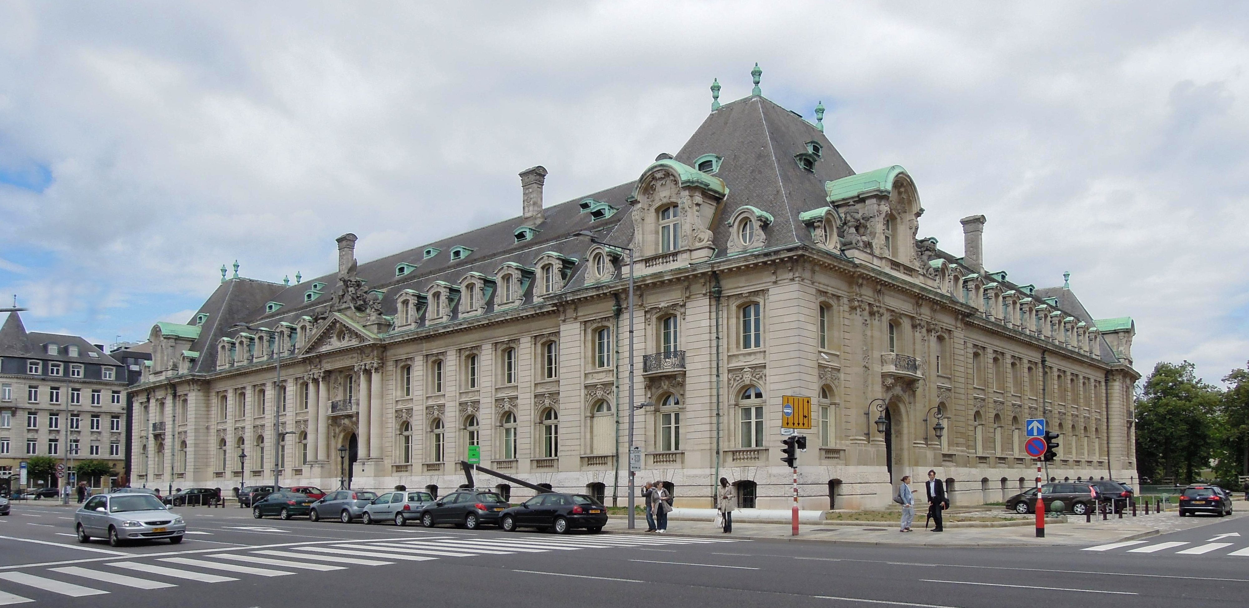 Arcelor Mittal building